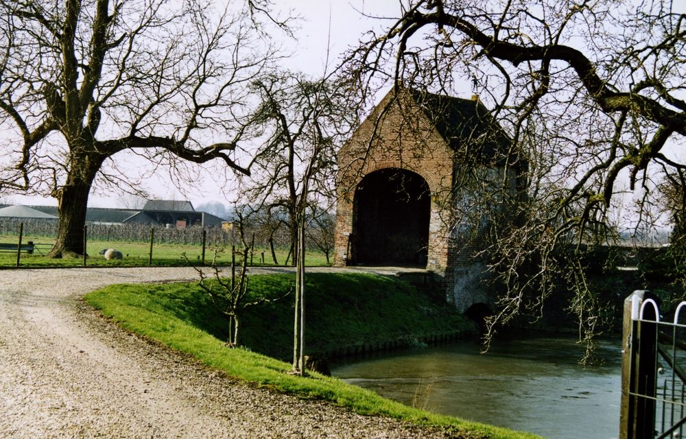 Het poortgebouw van het verdwenen kasteel Crayestein te Tricht.